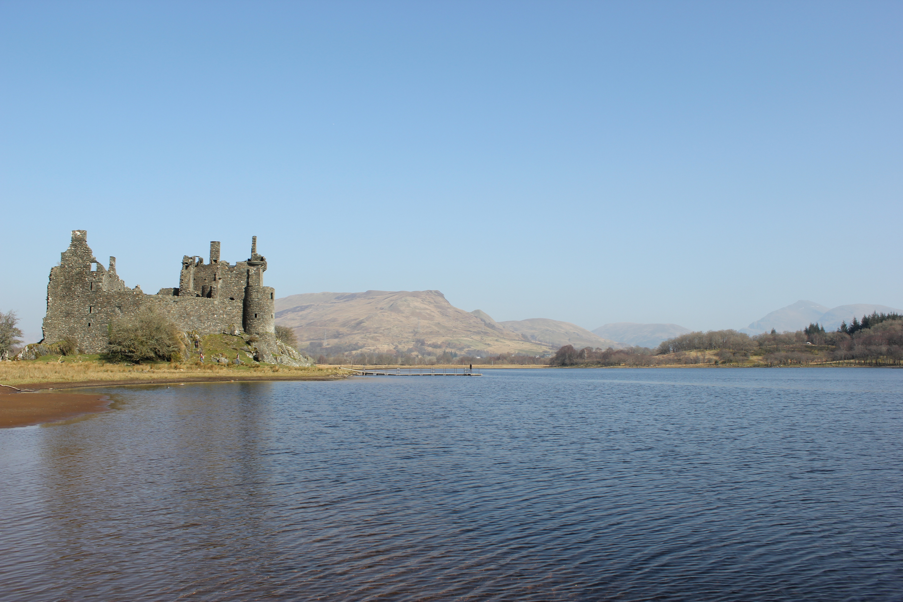 Die Ruine von Kilchurn Castle am Loch Awe, Schottland.